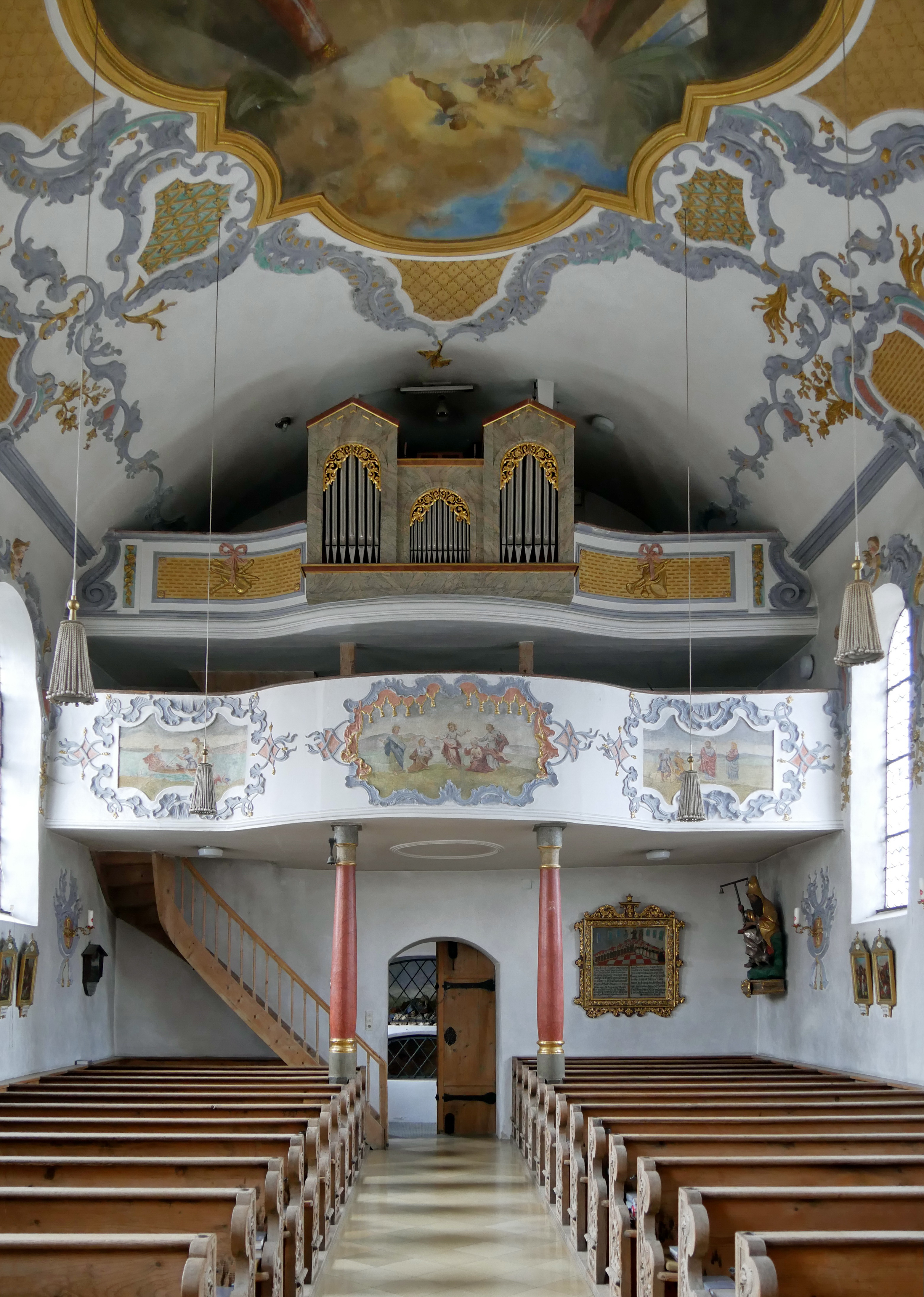 Finning, Ortsteil Oberfinning, Katholische Pfarrkirche Heilig Kreuz: Blick zur Orgel und Empore